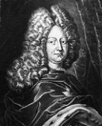 Herzog Friedrich II. von Sachsen-Gotha-Altenburg Sonstiges: * Bildbeschreibung: ... Sonstiges: gemeinfrei (public domain), da Schutzdauer abgelaufen, älter als 100 Jahre